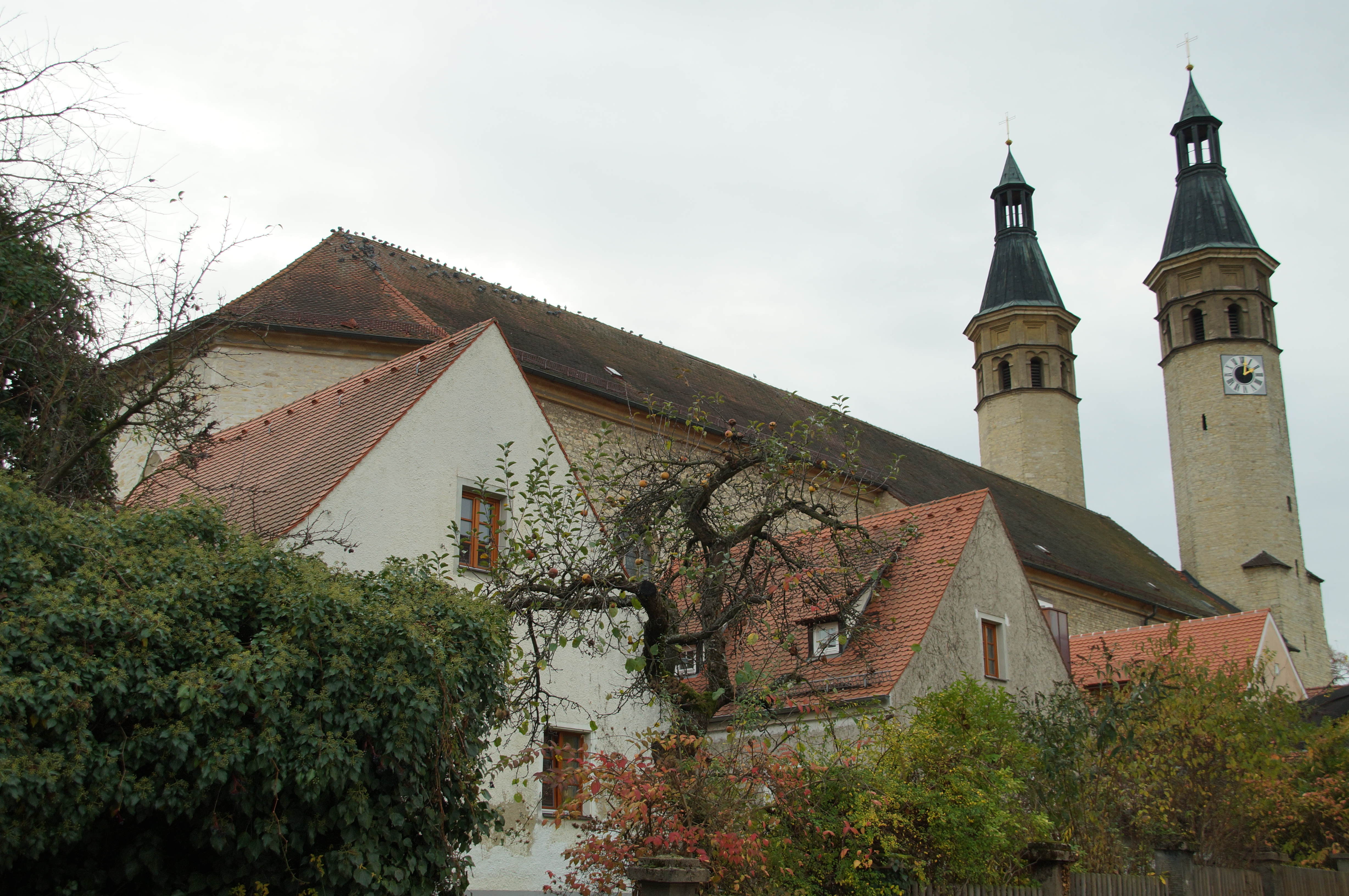 Karthause Prüll, Klosterkirche St. Vitus mit Eremitenklausen